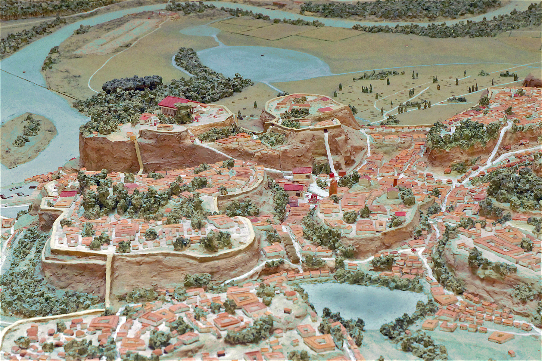 Maquette de Rome à l'époque archaïque (période entre la monarchie et la république) Au premier plan, la vallée entre les collines qui était à l'origine très marécageuse. Elle a été progressivement asséchée (Cloaca Maxima) puis le forum y a été installé. La maquette, a été réalisée sur la base de l'analyse comparée des sources historiques et des découvertes archéologiques, elle est à l'échelle 1:1000. ______ Le Musée de la Civilisation Romaine, inauguré en 1955, illustre, dans ses 59 sections, tous les aspects de l'ancienne civilisation romaine à travers une vaste collection de moulages d'après les originaux, conservés dans tous les Musées du monde, mais qui sont aujourd'hui détruits ou endommagés, et à travers des maquettes reproduisant les monuments éparpillés sur toute la superficie de l'Empire romain. Le premier noyau des collections remonte à l'exposition archéologique organisée en 1911 dans le cadre des manifestations pour le cinquantenaire de l'unification d'Italie. Les 14 premières sections représentent une synthèse historique de Rome, des origines au VI siècle. Le restant des 45 sections est dédié aux aspects de la vie publique, religieuse, économique, militaire ainsi que privée. Les deux points forts du musée sont : - la grande maquette qui reproduit la ville de Rome à l'époque de l'Empereur Constantin, - les moulages de la Colonne Trajane